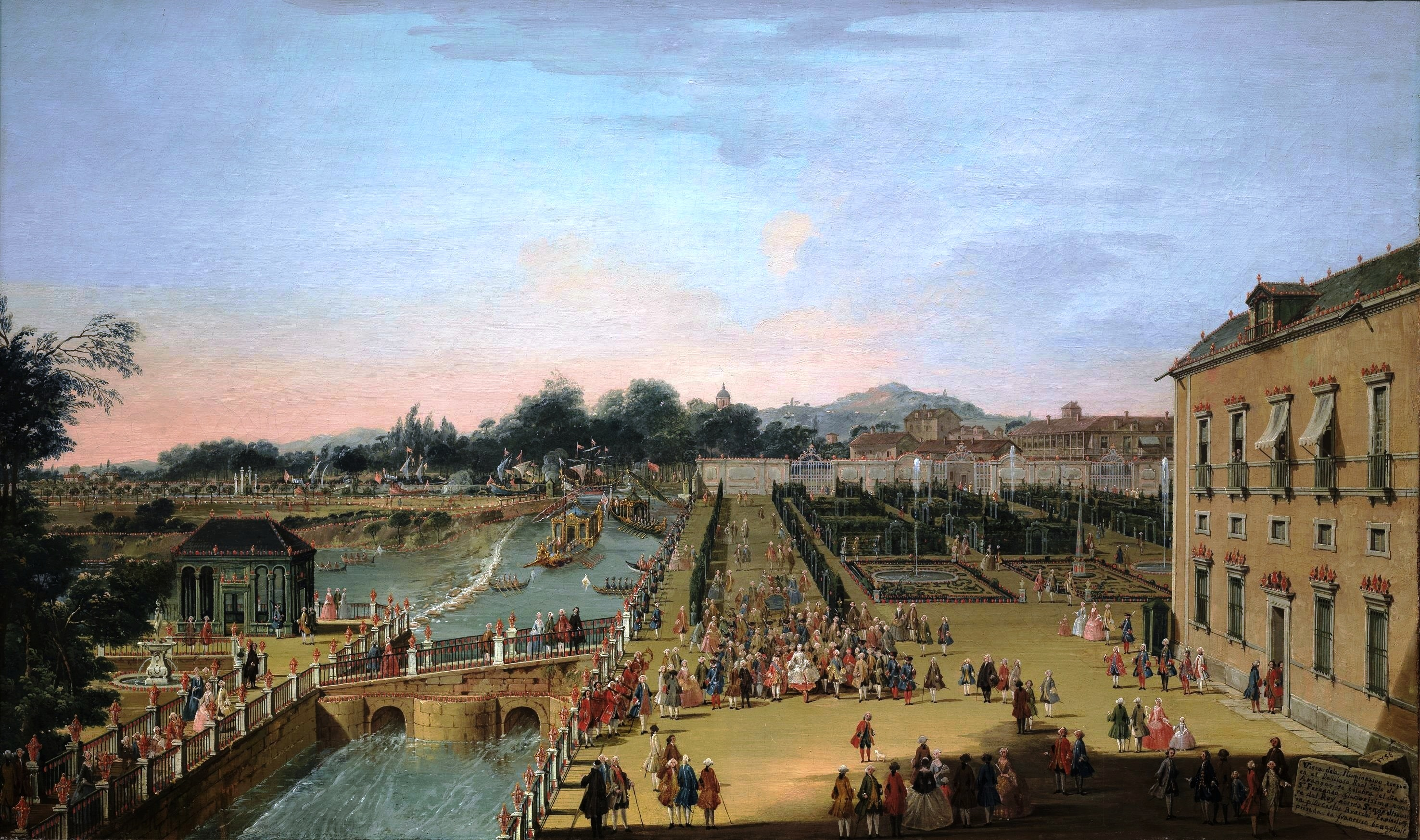 La obra muestra al rey Fernando VI de España y a la reina Bárbara de Braganza, su esposa, en los jaridines del Palacio Real de Aranjuez.